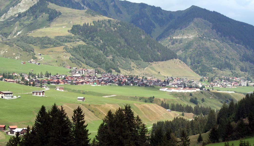 Sedrun GR